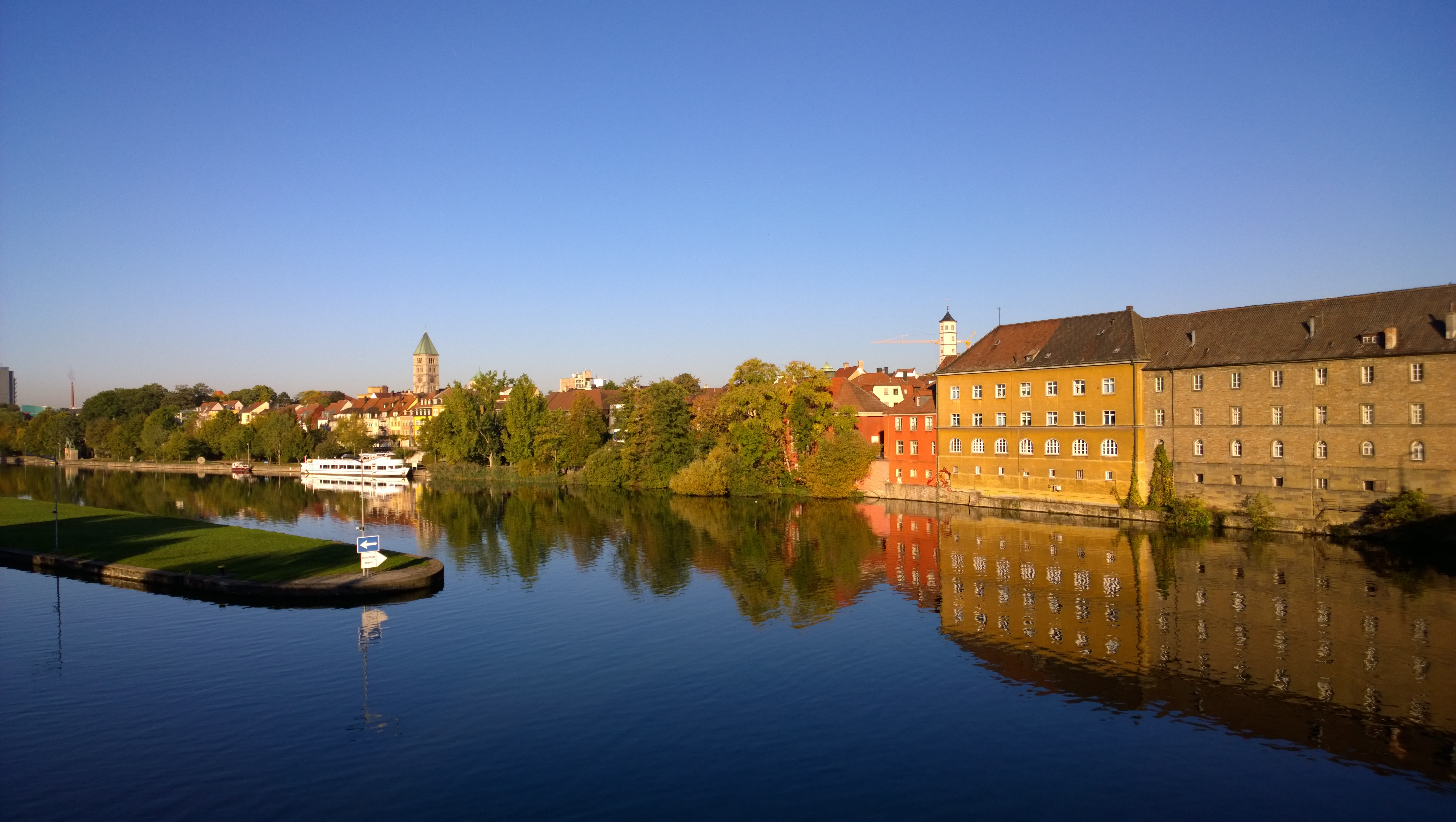 Blick von der Maxbrücke auf die Schweinfurter Gutermannpromenade mit der ehemaligen SpinnmühleThis is a photograph of an architectural monument. BY-SA 3.0